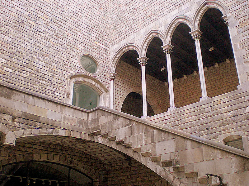 Barcelona - Escala del pati d´entrada del Museu de Història de la Ciutat